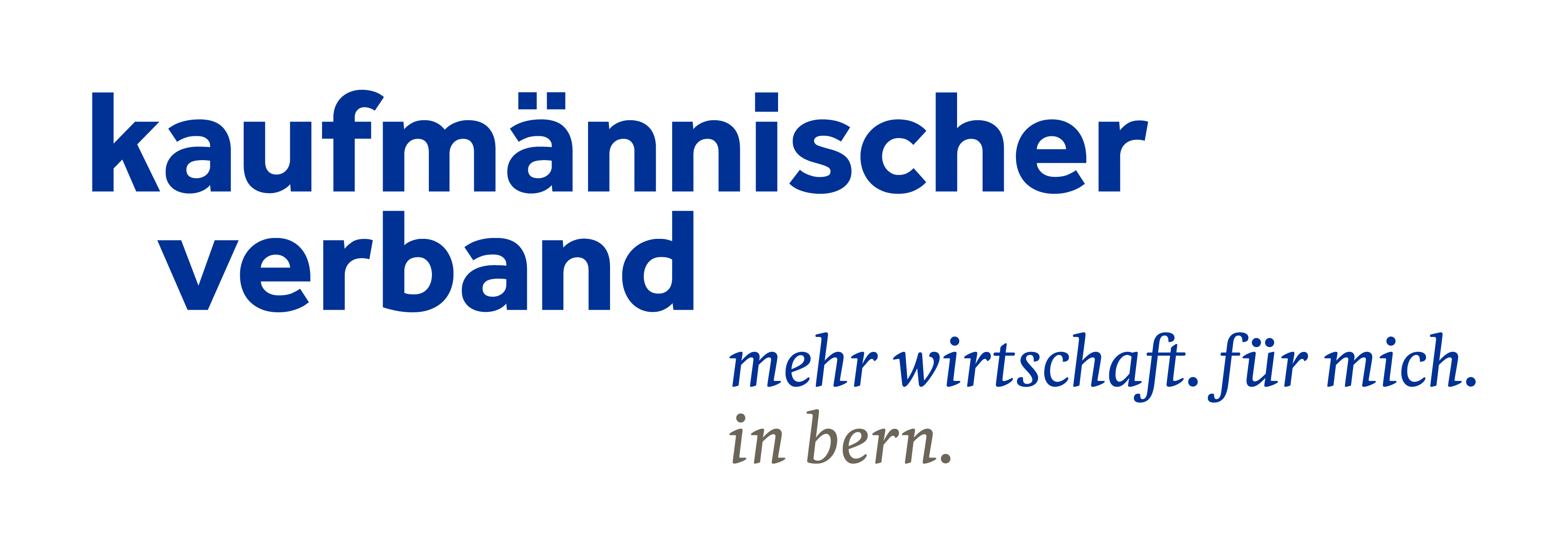 Logo of Kaufmännischer Verband Bern